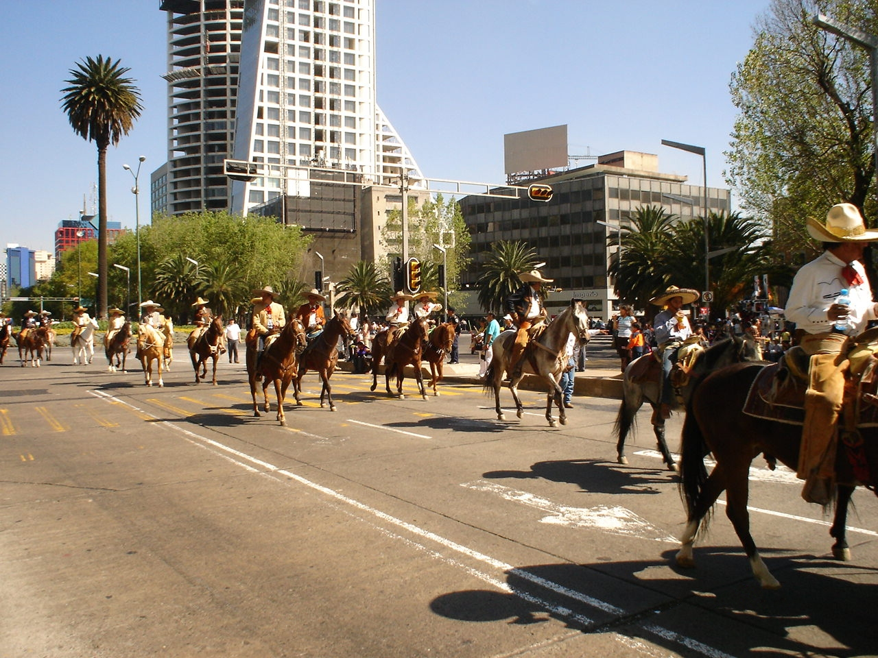 AGRUPAMIENTO DE CHARROS